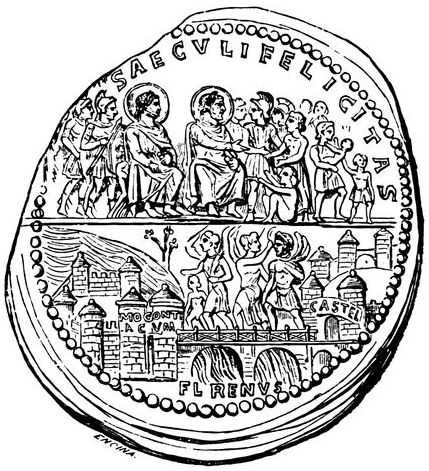 Zeichnung des Lyoner Bleimedaillons auf der die Einzelheiten des Medaillons herausgearbeitet worden sind.